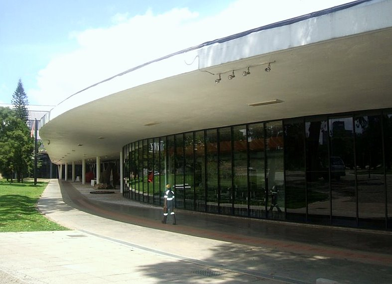 Fachada do Museu de Arte Moderna de São Paulo, no Parque do Ibirapuera.